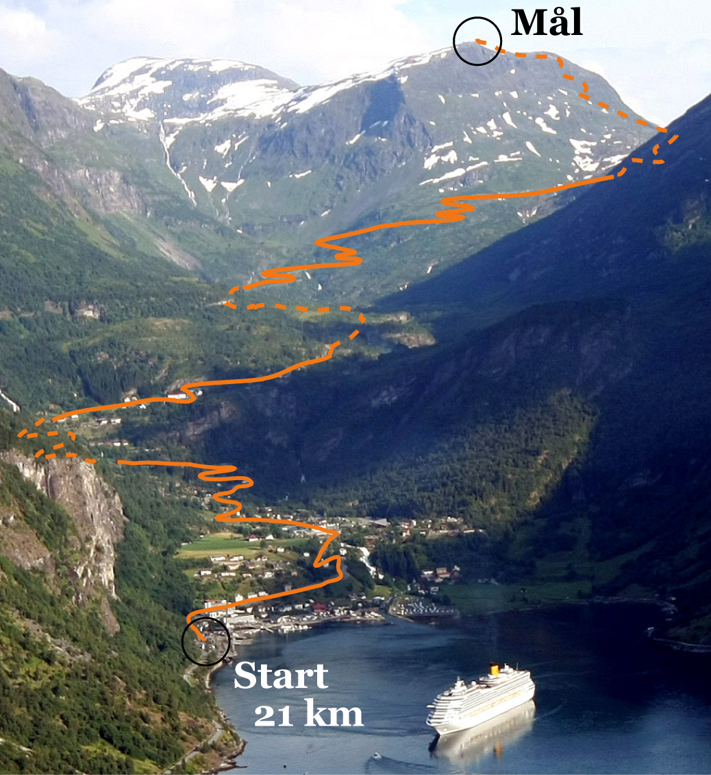 Løypa startar ved Geirangerfjorden og har mål på Dalsnibba, 1500 meter over havet.